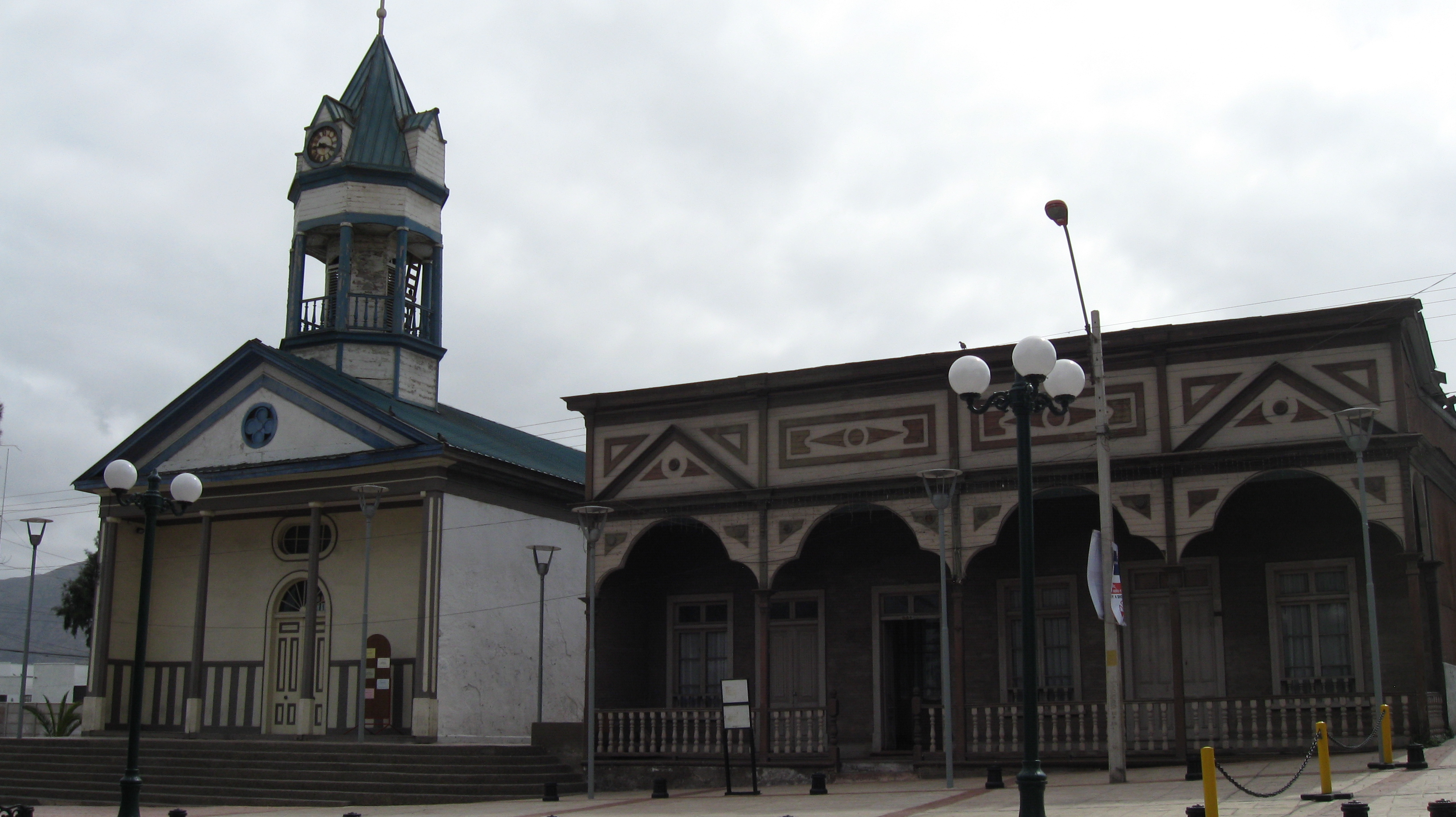 Iglesia de Chañaral This is a photo of a national monument in Chile: 326